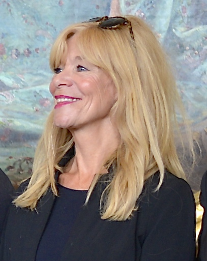 Mia Benson under Dramatens höstsamling 2014.